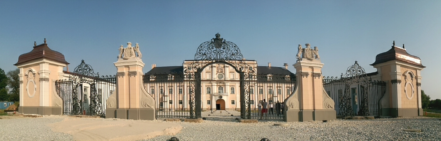 L’Huillier-Coburg-kastély főhomlokzata a kovácsoltvas kapuval This is a photo of a monument in Hungary. Identifier: 2726